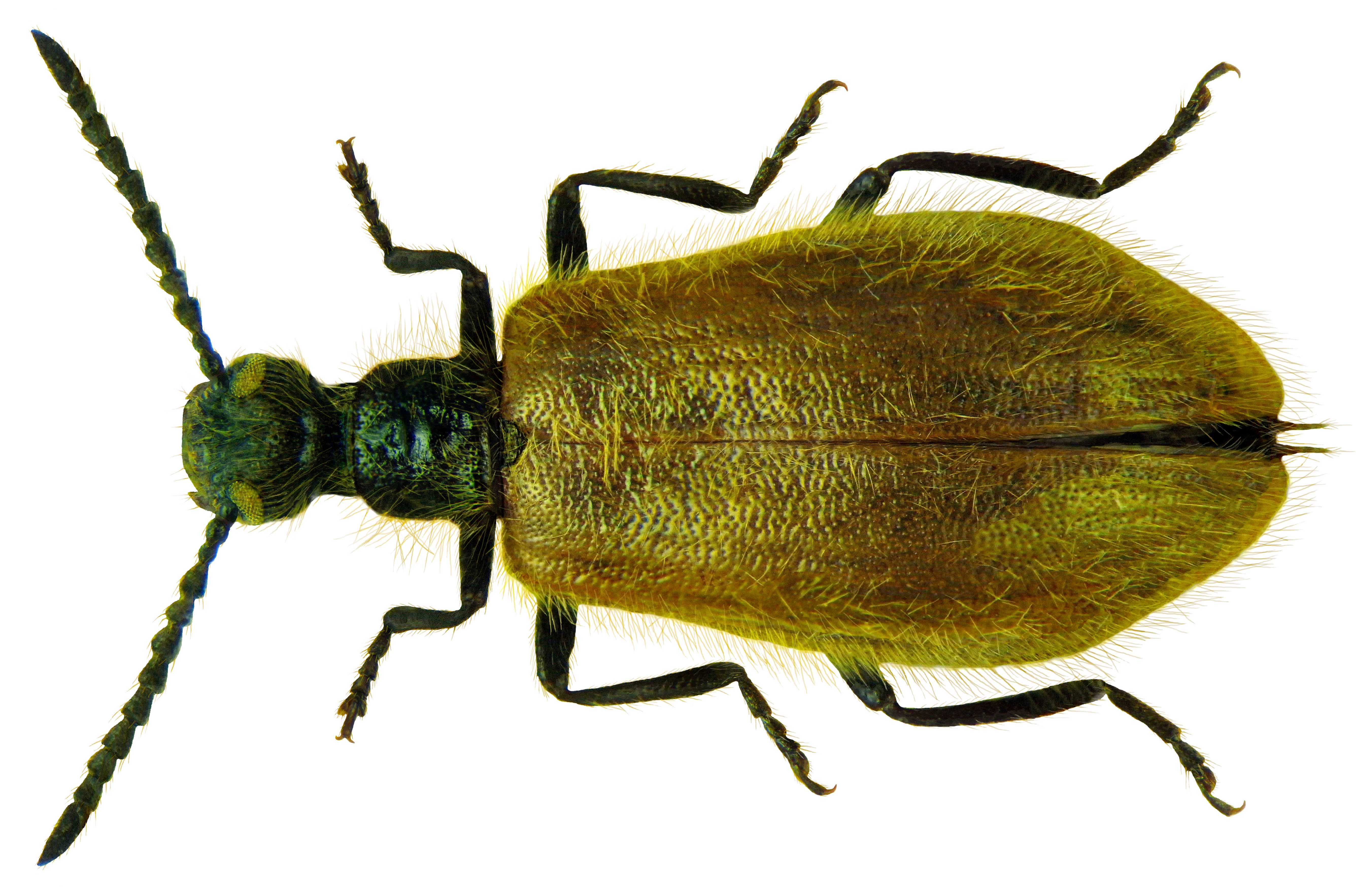 Familie: Lagriidae Groesse: 7-10 mm Verbreitung: Europa Oekologie: an verschiedenen Pflanzen Fundort: Germania, Bayern, Oberfranken, Kasendorf leg.det. U.Schmidt, 1972 Photo: U.Schmidt, 2011